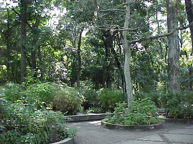 Esculturas en Parque Los Caobos en Caracas - Venezuela 2000